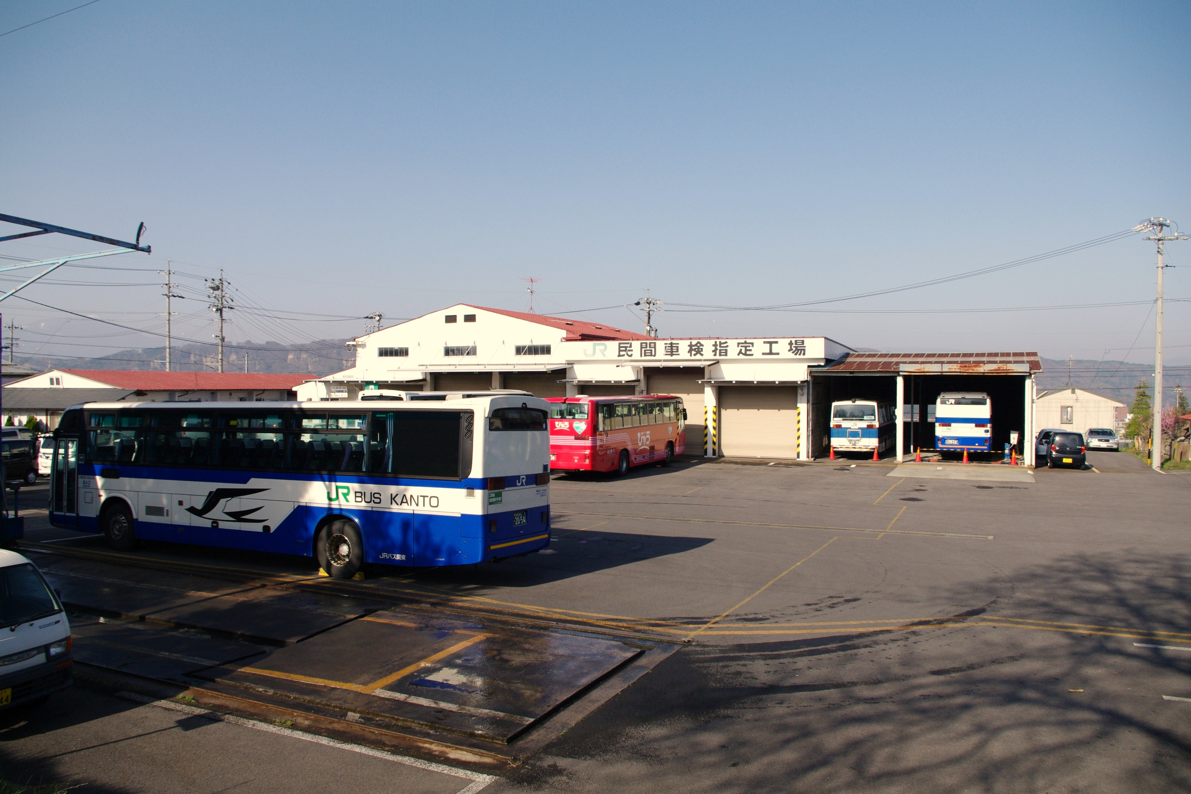 ジェイアールバス関東小諸支店